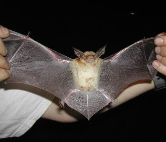 Pallid Bat (Antrozous pallidus)